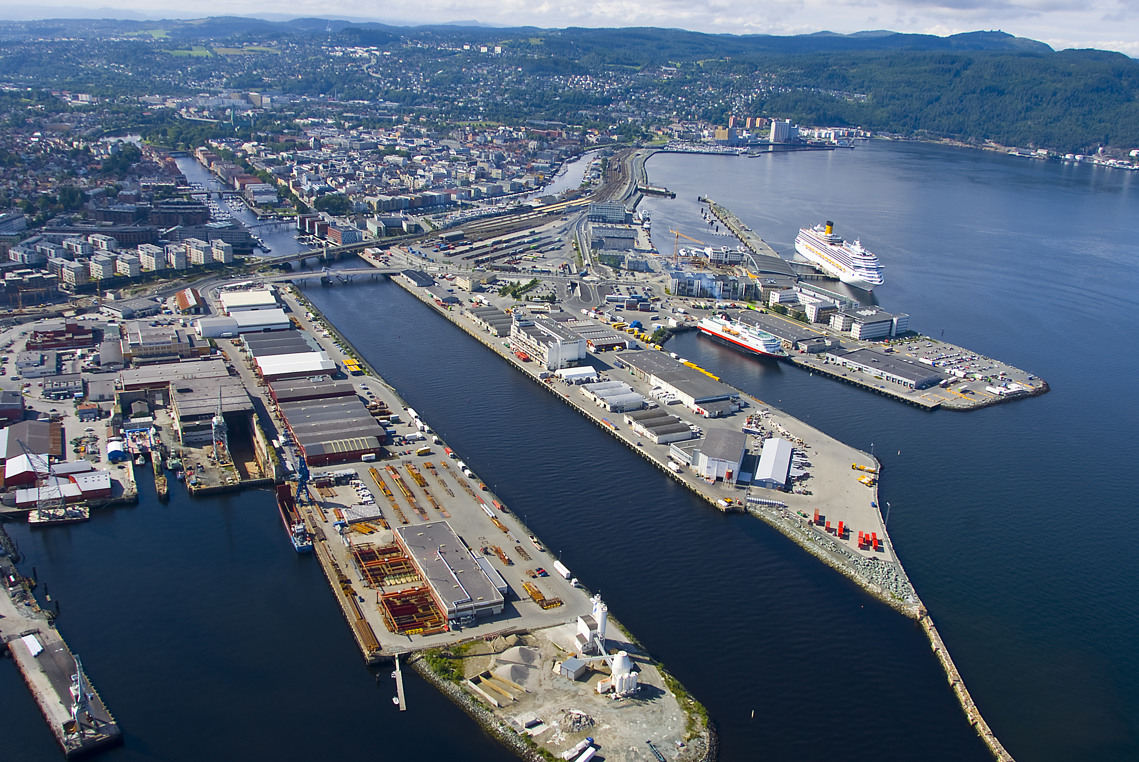 Foto: Trondheim Havn/Åge Hojem